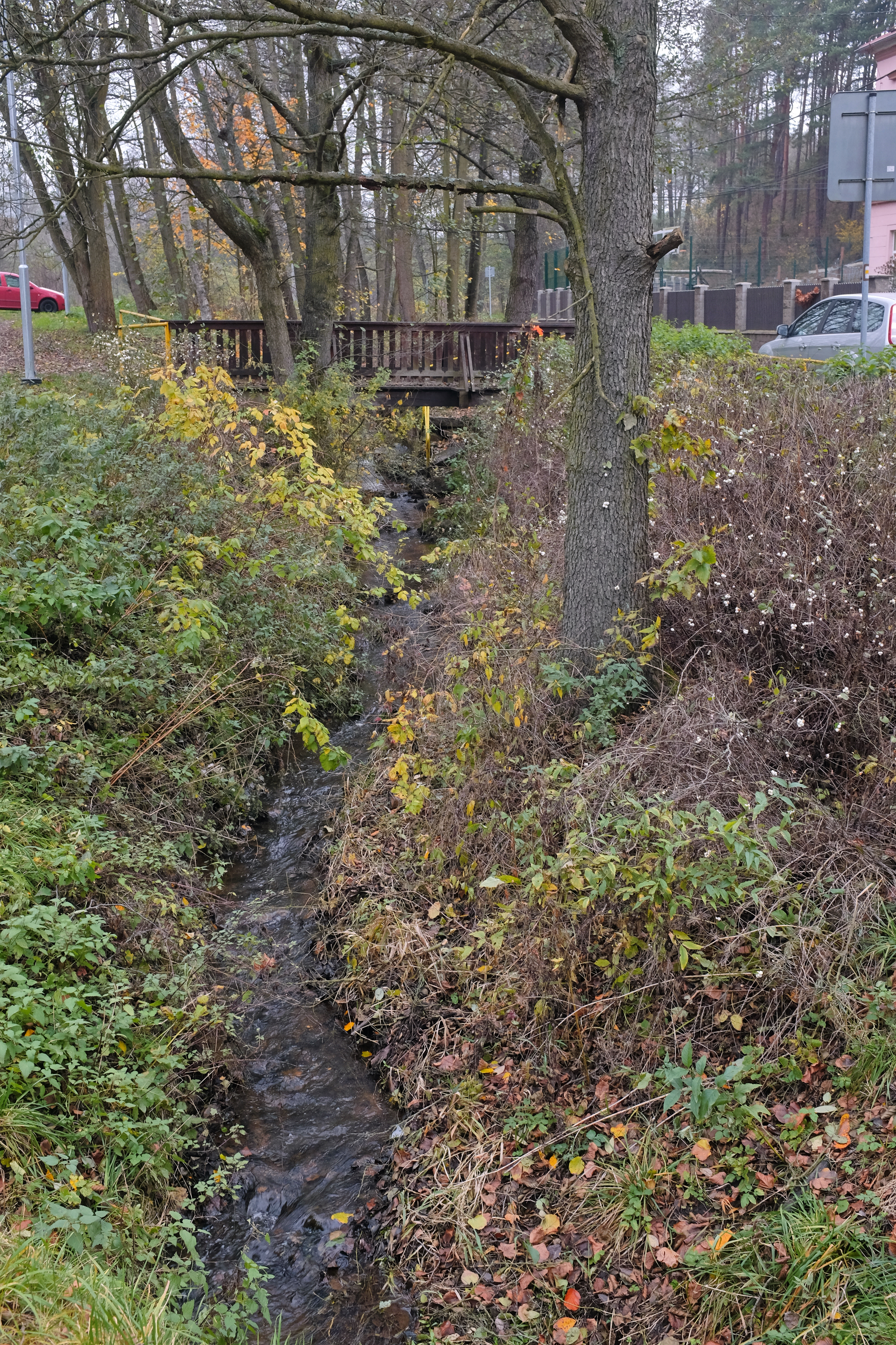 Sadovský potok, přítok Vitického potoka, v Sadově, okres Karlovy Vary